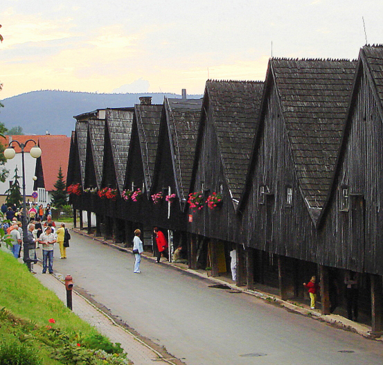 Chełmsko Śląskie, zespół domów, tzw. Dwunastu Apostołów, 1707